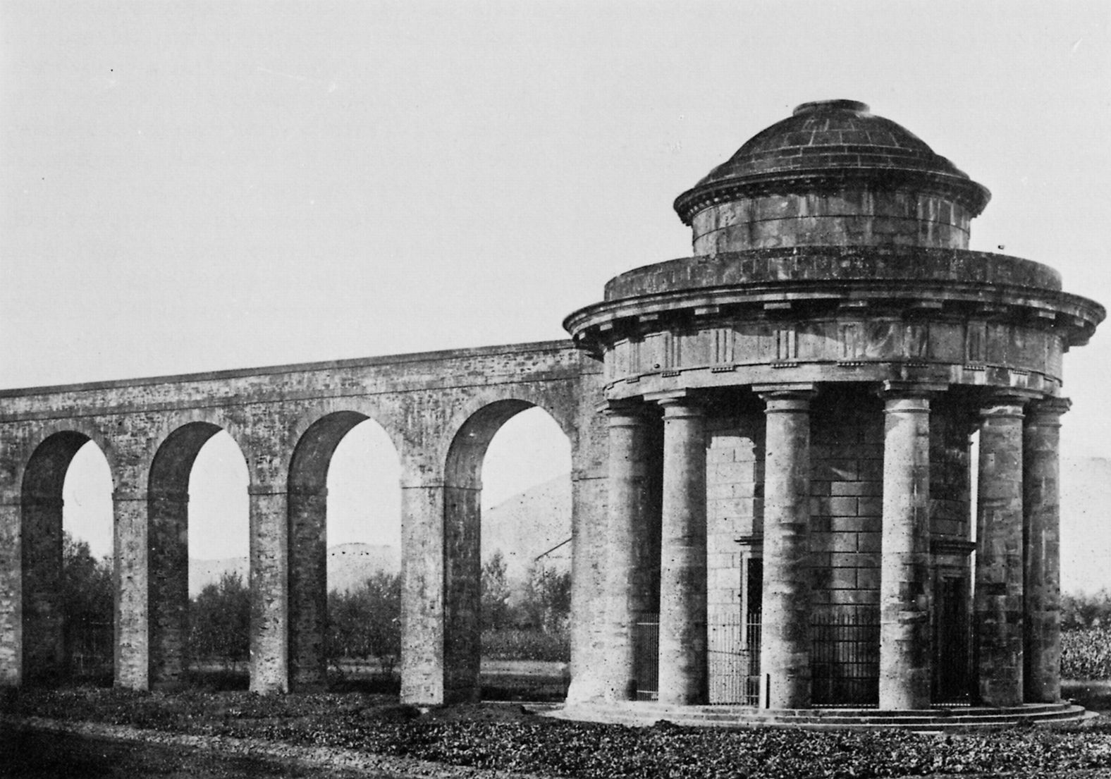 Gebrüder Alinari: Der Aquädukt in Lucca